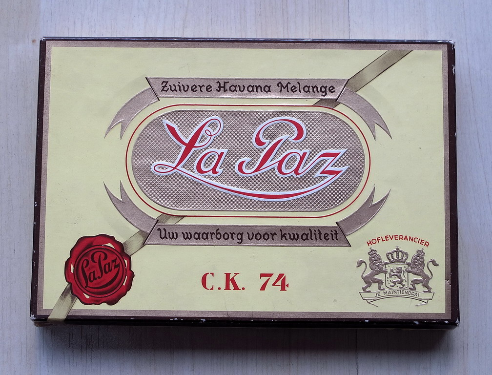 10 sigaren 1929. Nederland La Paz Sigarenfabrieken Boxtel. De waarschijnlijkste verklaring voor de naam La Paz is dat het een verwijzing is naar dhr. Van der Pasch, een sigarenmaker uit Boxtel, die in 1813 een sigarenmerk wilde met een internationale uitstraling. In 2000 werd La Paz Sigarenfabrieken b.v. een onderdeel van Swedish Match, een beursgenoteerde firma met de hoofdzetel in Stockholm.